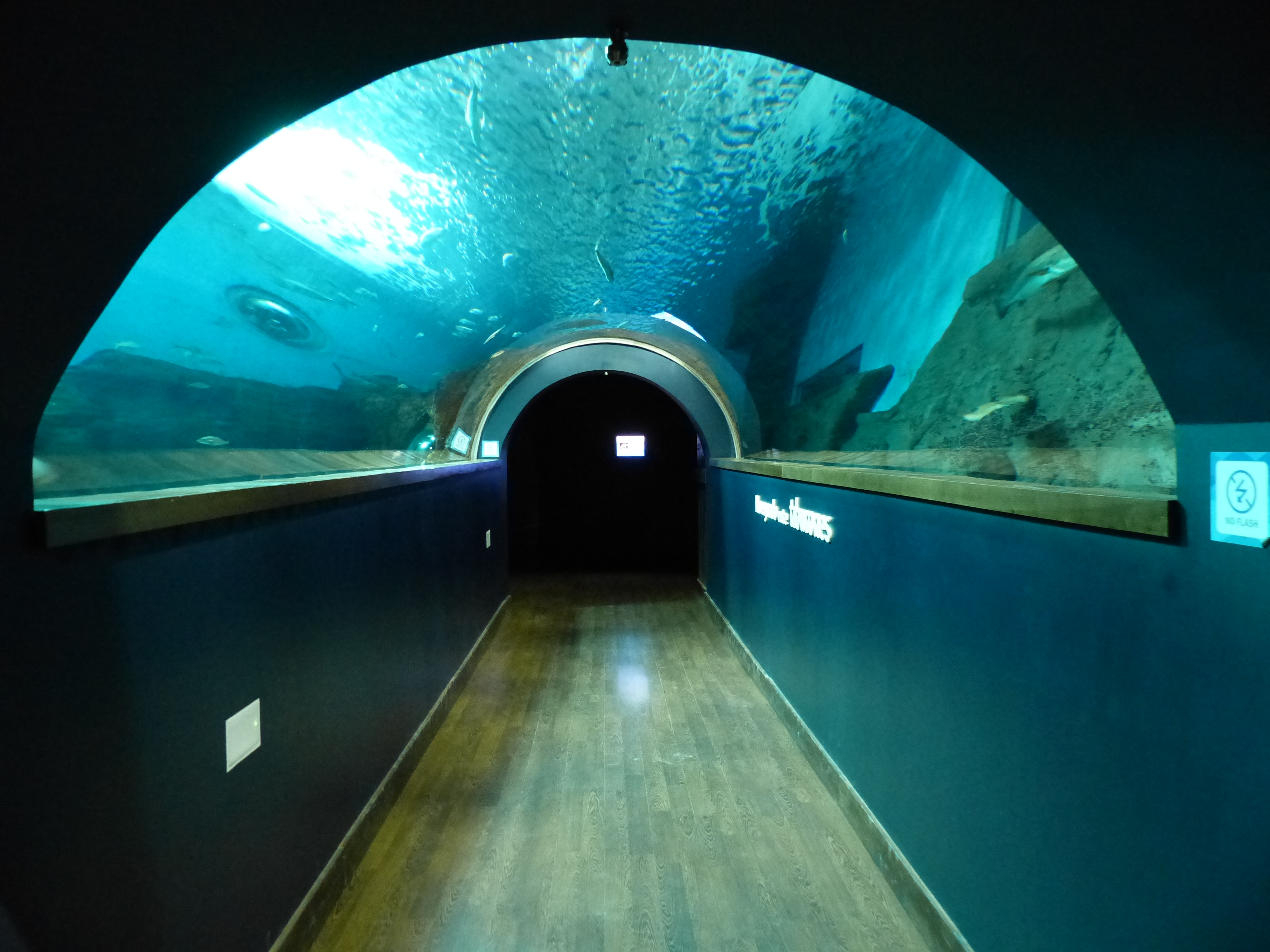 Acuario de Sevilla